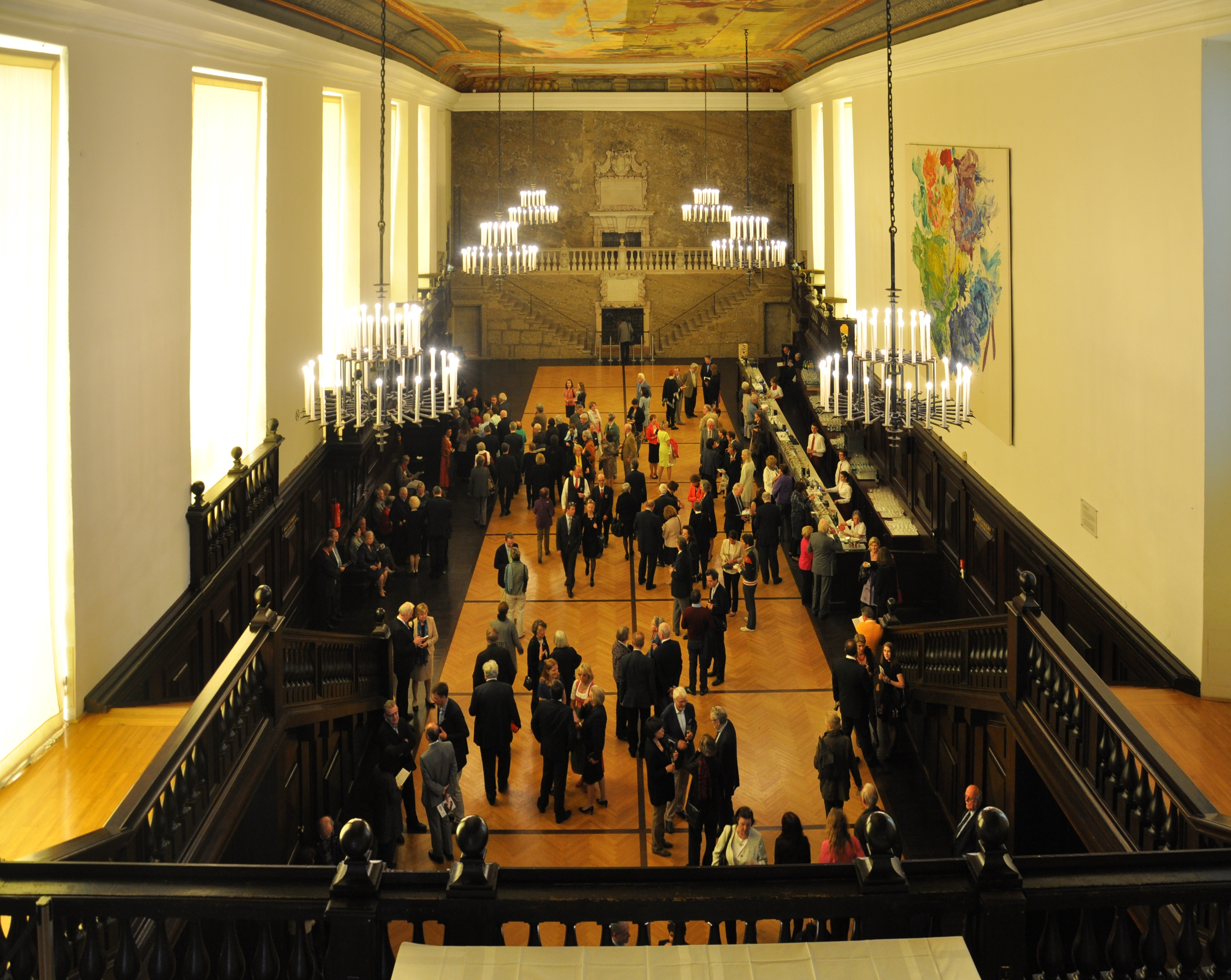 Salzburg, Karl-Böhm-Saal im Festspielhauskomplex (errichtet 1660 als Winterreitschule)